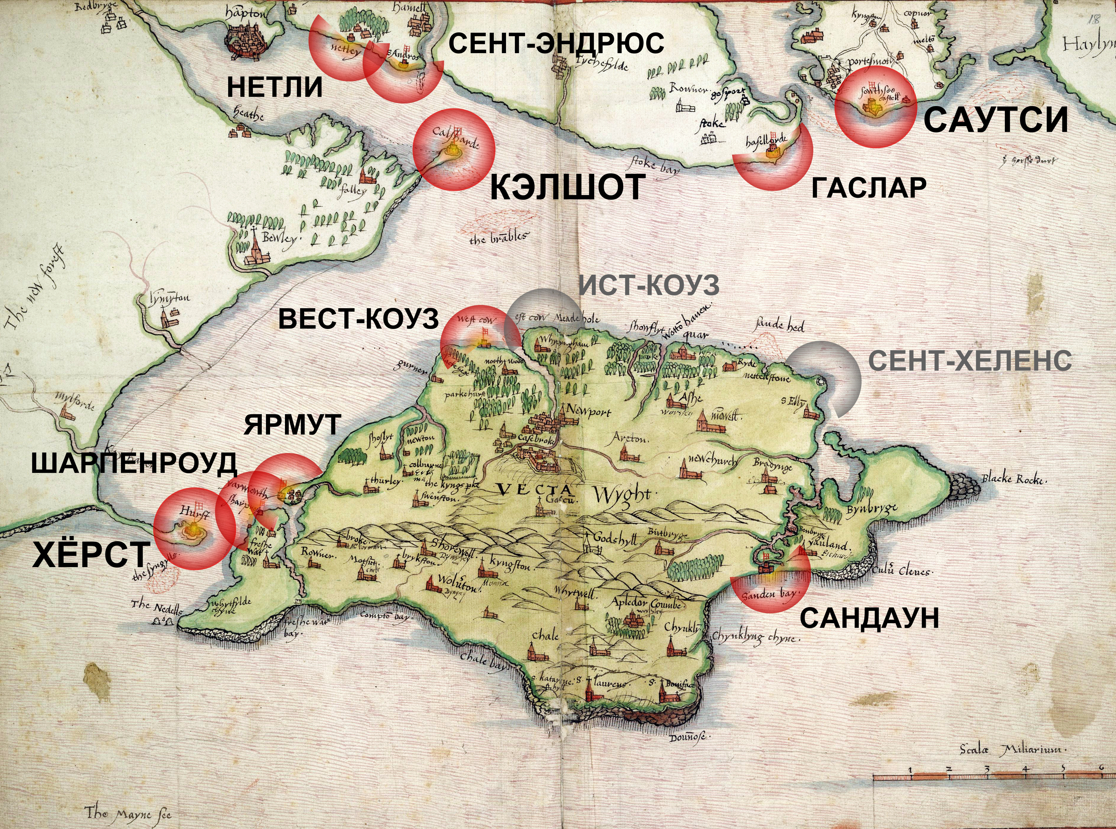 Оборона острова Уайт, Солента, Саутгемптона и Портсмута в 1570 году. Радиус каждого круга (сектора) обстрела 1 миля. Два форта, отмеченных серым, уже выведены из строя .